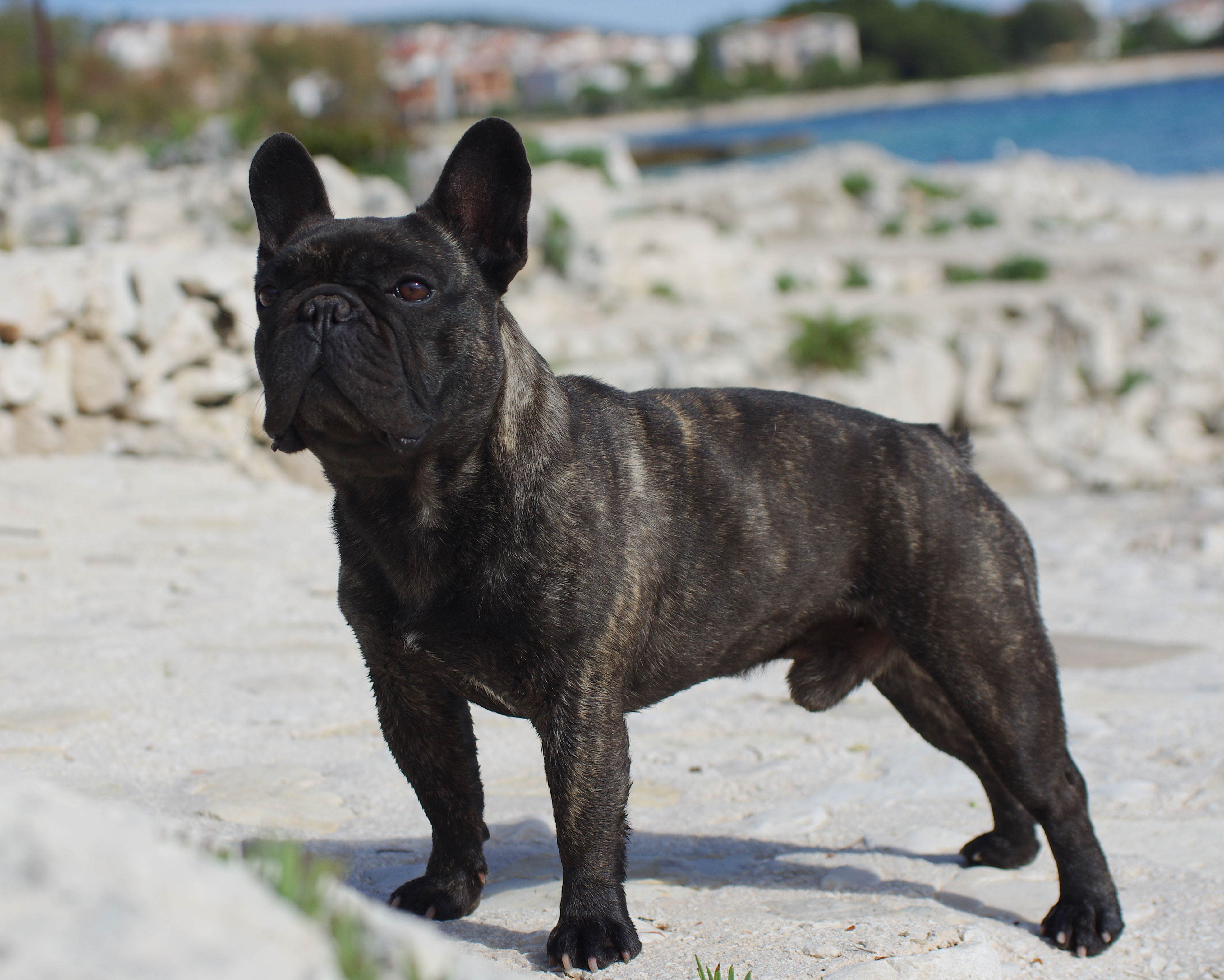 Mužjak francuskog buldoga